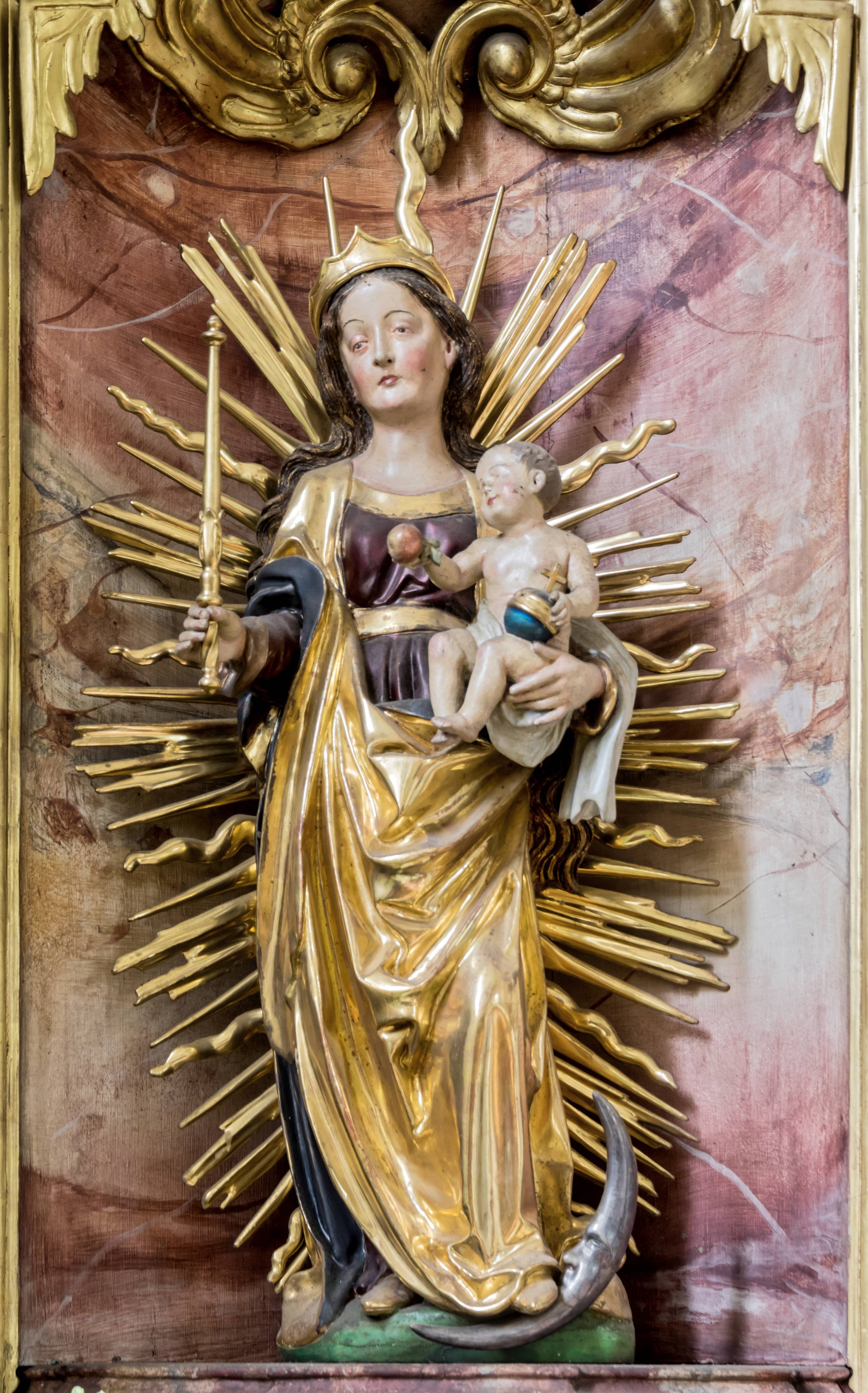 Bilder aus Freiburg von der Kirche St.Peter und Paul in Freiburg Kappel Muttergottes Gnadenbild im linken Seitenaltar